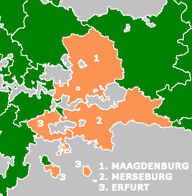 Regierungsbezirke in Saksen 1878